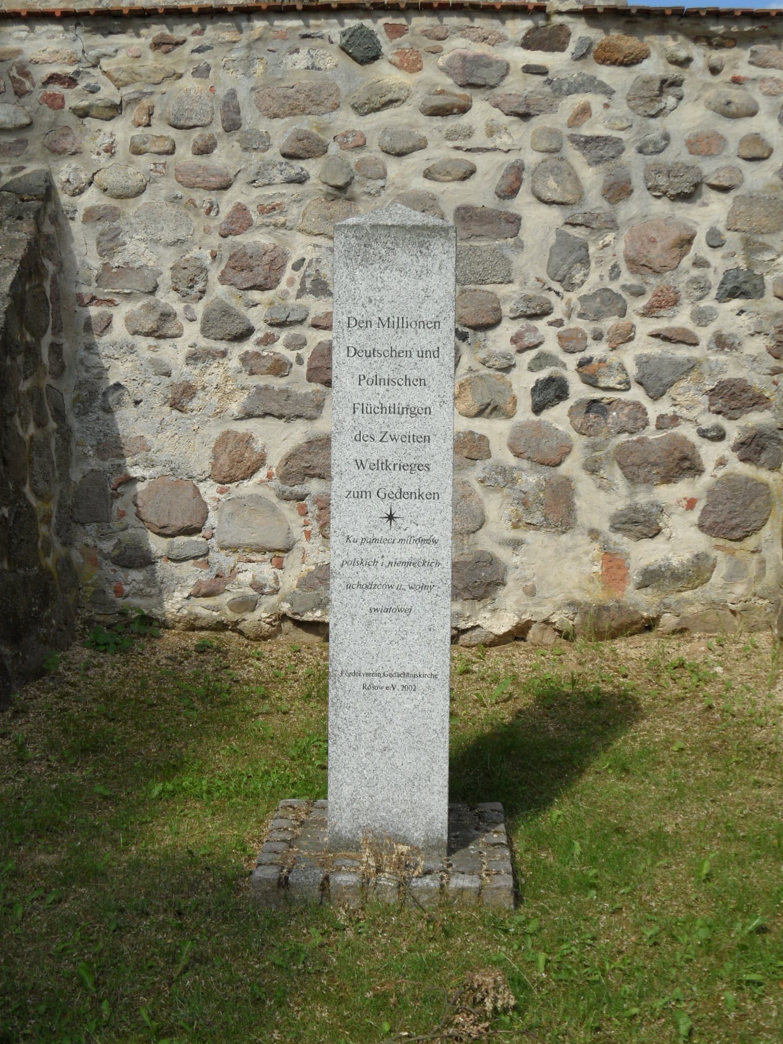 Gedächtniskirche Rosow, Ortsteil von Mescherin im Landkreis Uckermark (Brandenburg), Gedenkstele